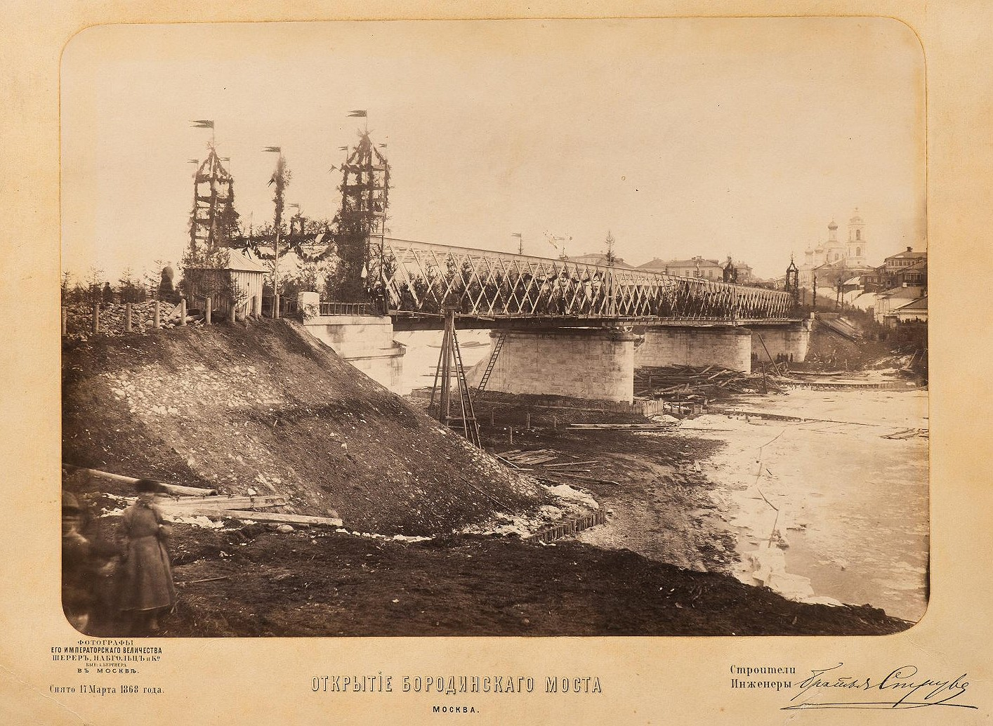 Москва. Бородинский мост. Торжественное открытие. 17марта1868г. Фото Шерер. (с автографом инженера-строителя моста - А.Струве. Вид с Дорогомилова на запад, к центру города. Вдали прямо - не существующая ныне Смоленская церковь на стрелке Смоленской улицы и Плющихи (1689-1691). )